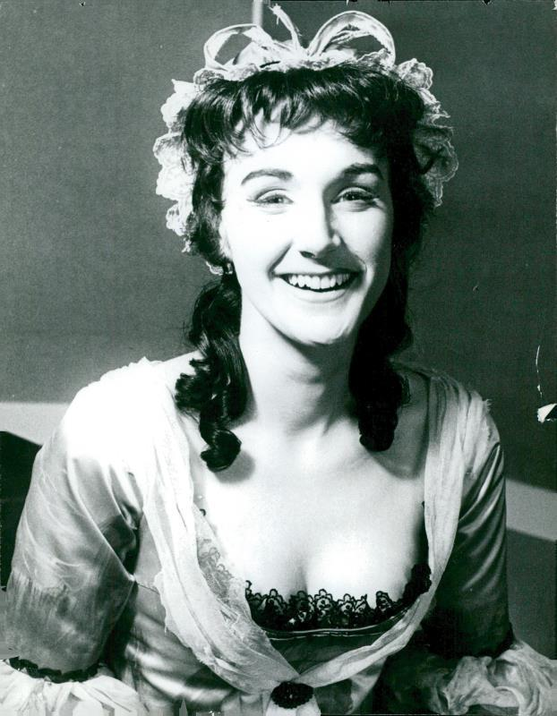 Foto på Fillie Lyckow infört i Svenska Dagbladet 1964-01-11.